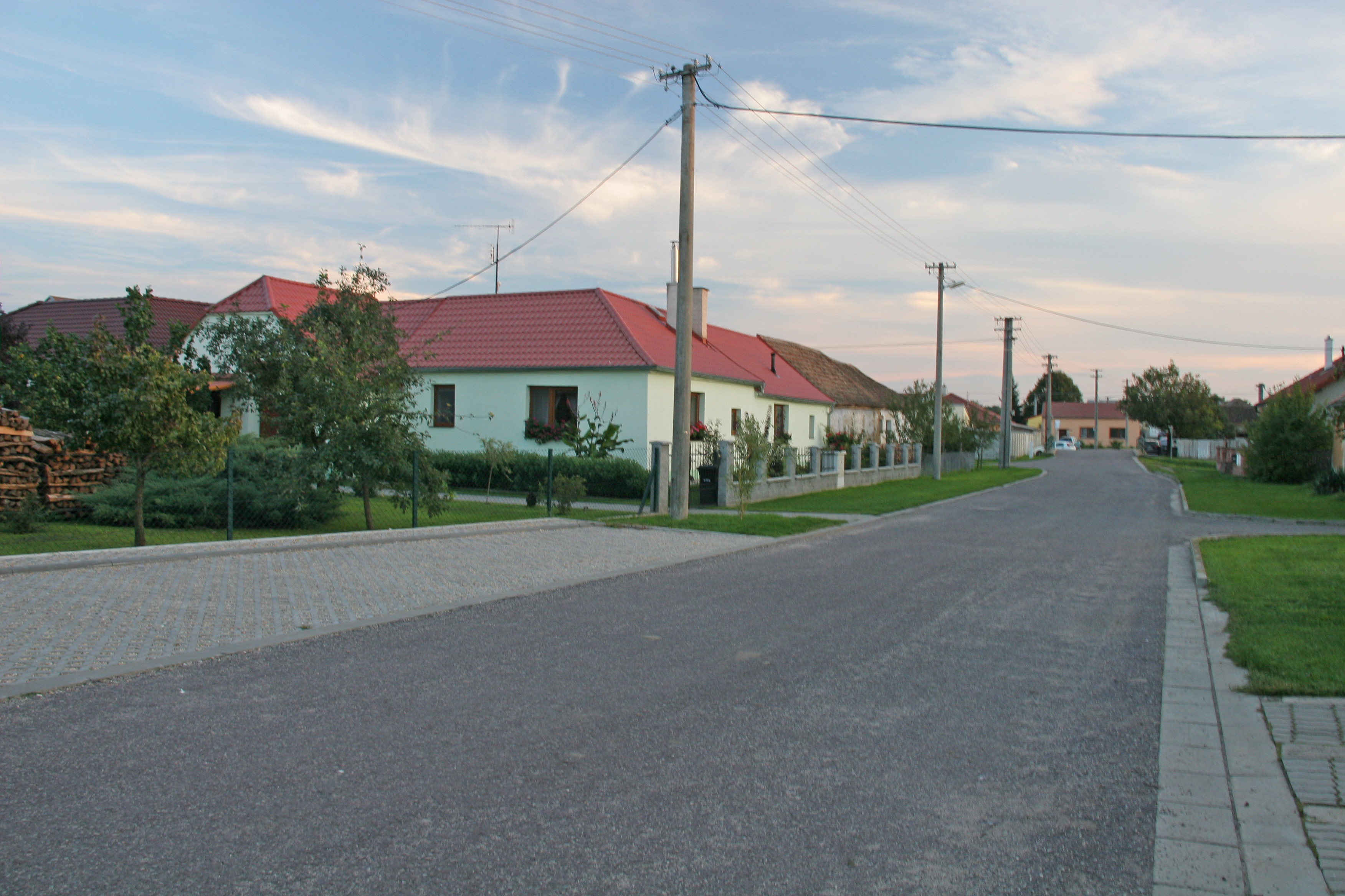 Dyjákovičky čp. 72